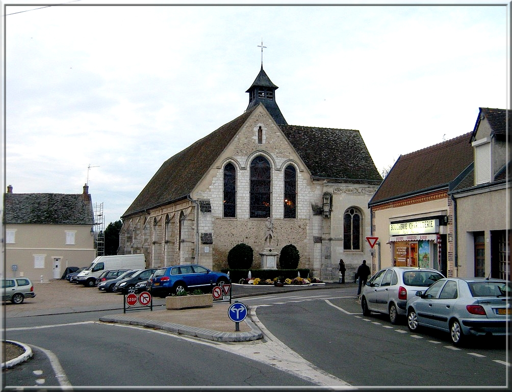 Église de Cherisy. Photo Eric Dubois (Ericaef).